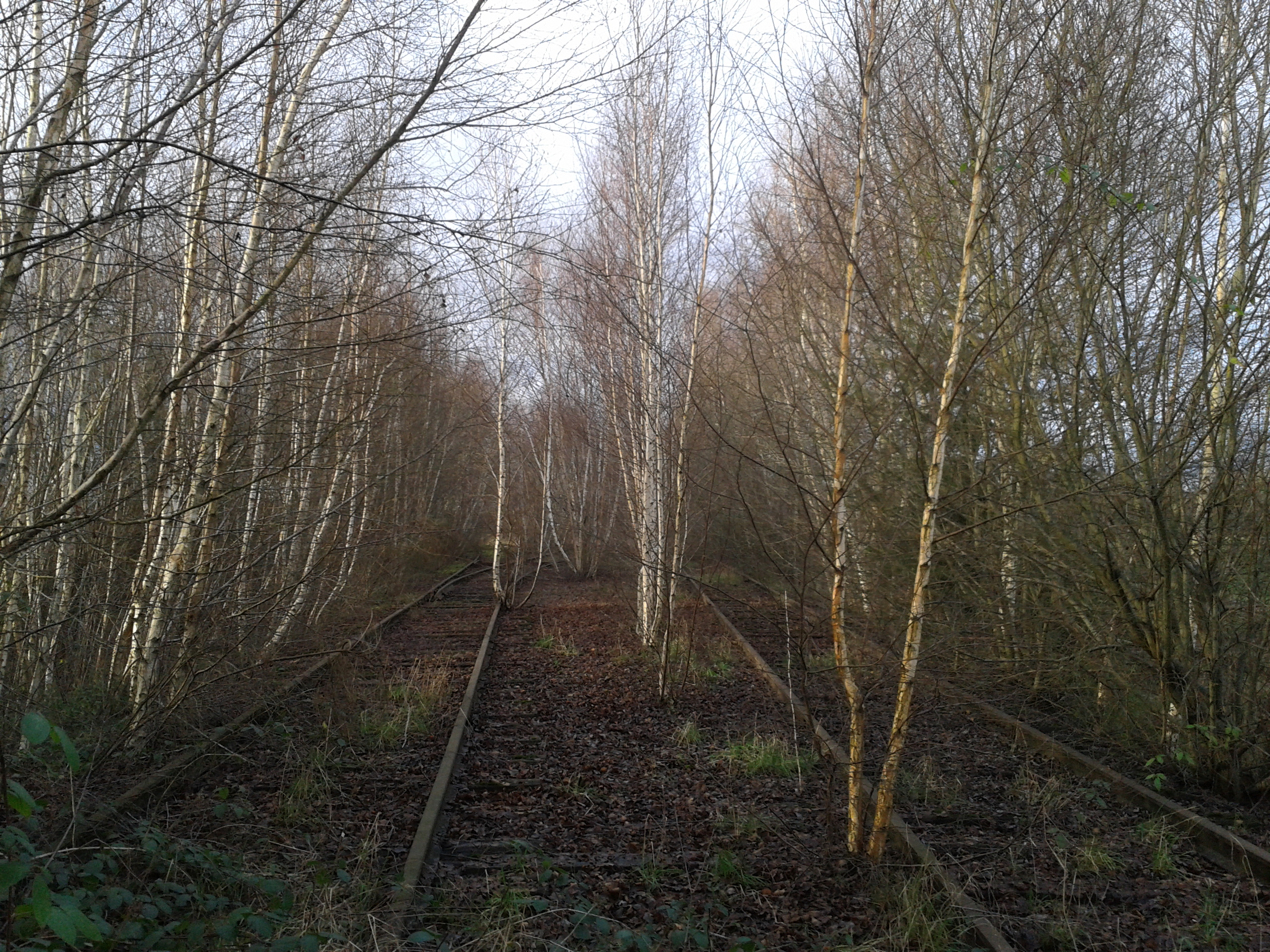 Voies désaffectées de la ligne de Vitré à Pontorson dans la zone industrielle de l'Aumaillerie à La Selle-en-Luitré.